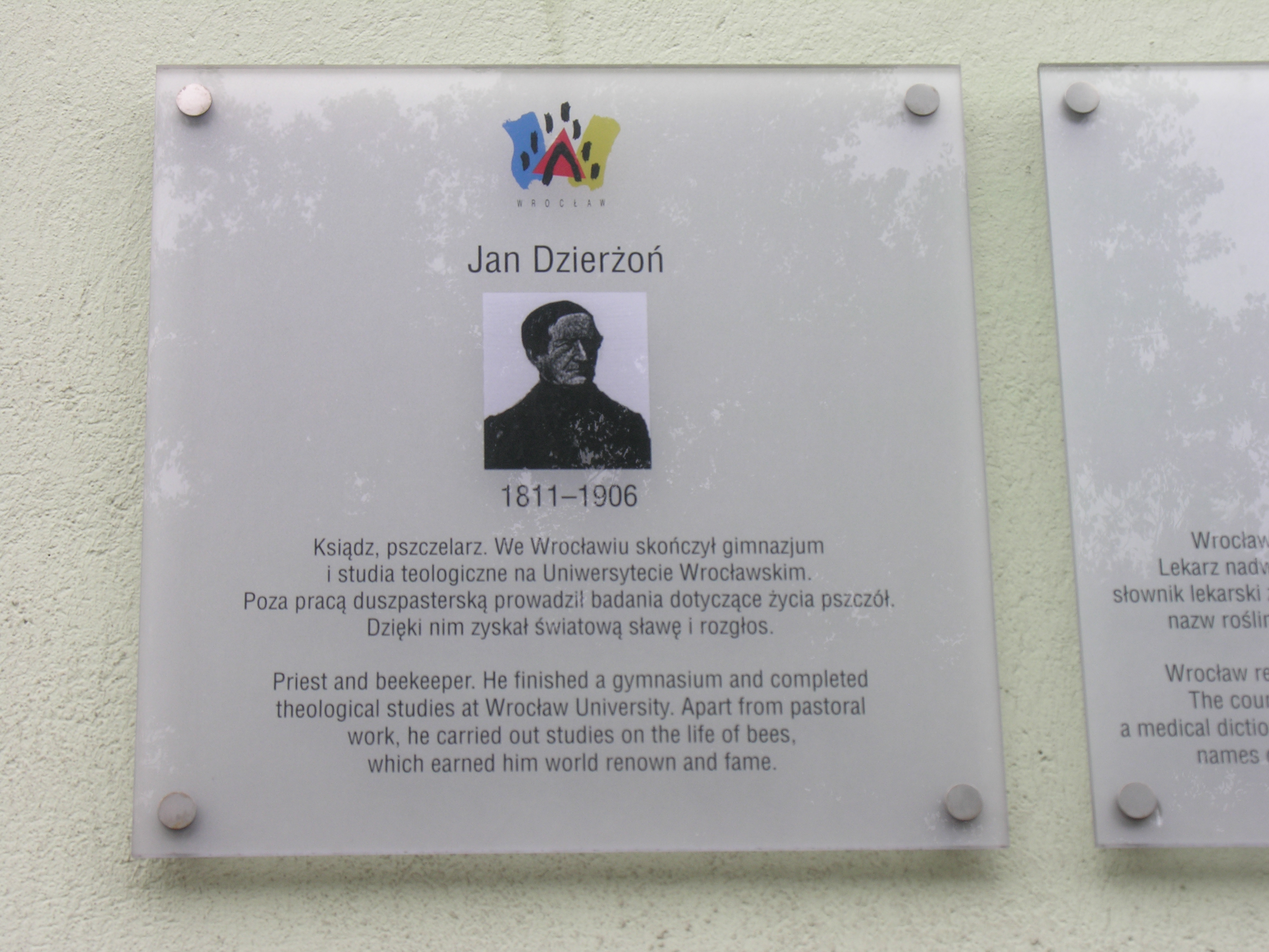 Tablica ku czci Jana Dzierżonia we Wrocławiu, ul. Sienkiewicza 23